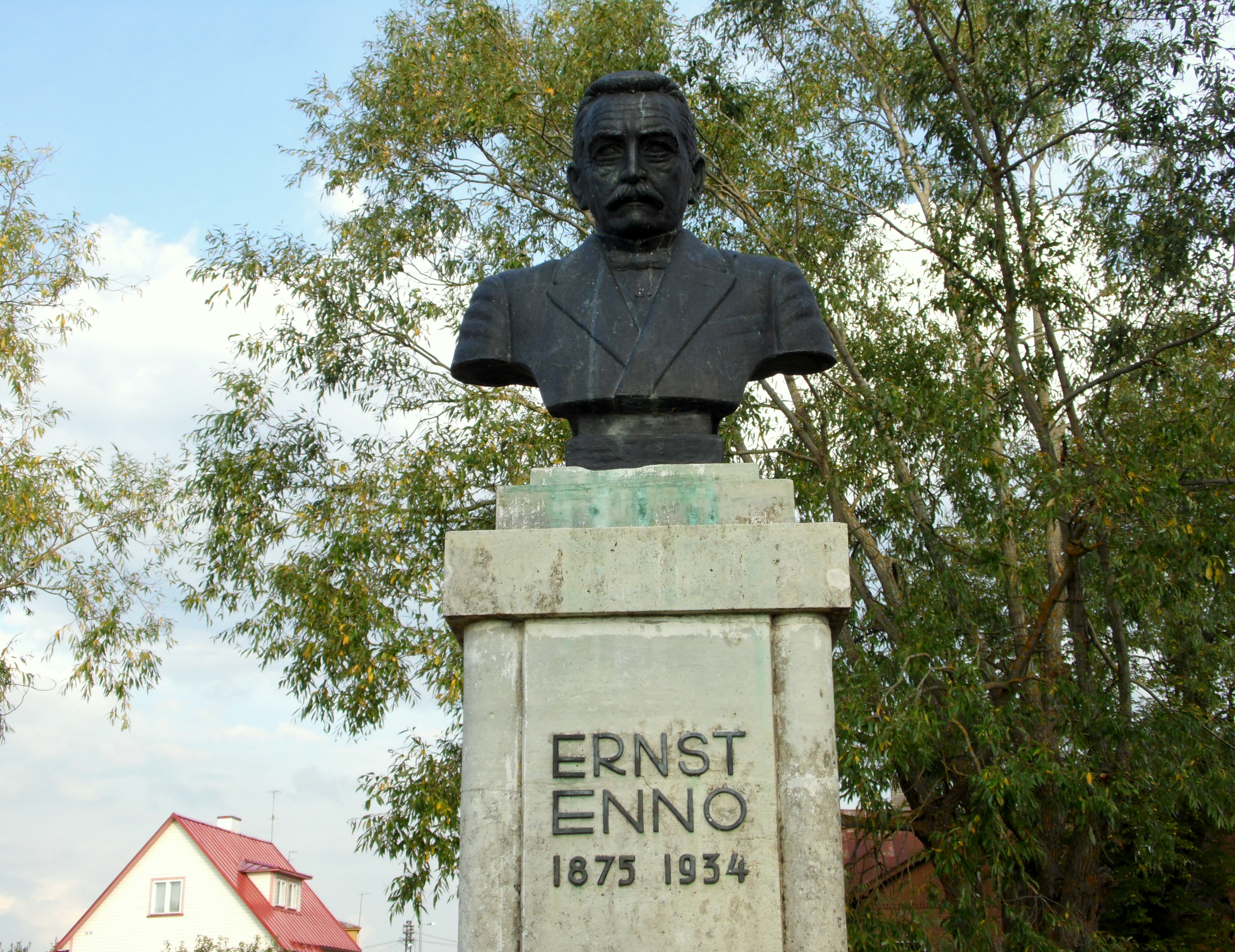 Haapsalus lõi Ernst Enno suurema osa oma lastelaulude paremikust. Kalda tn 28, Haapsalu